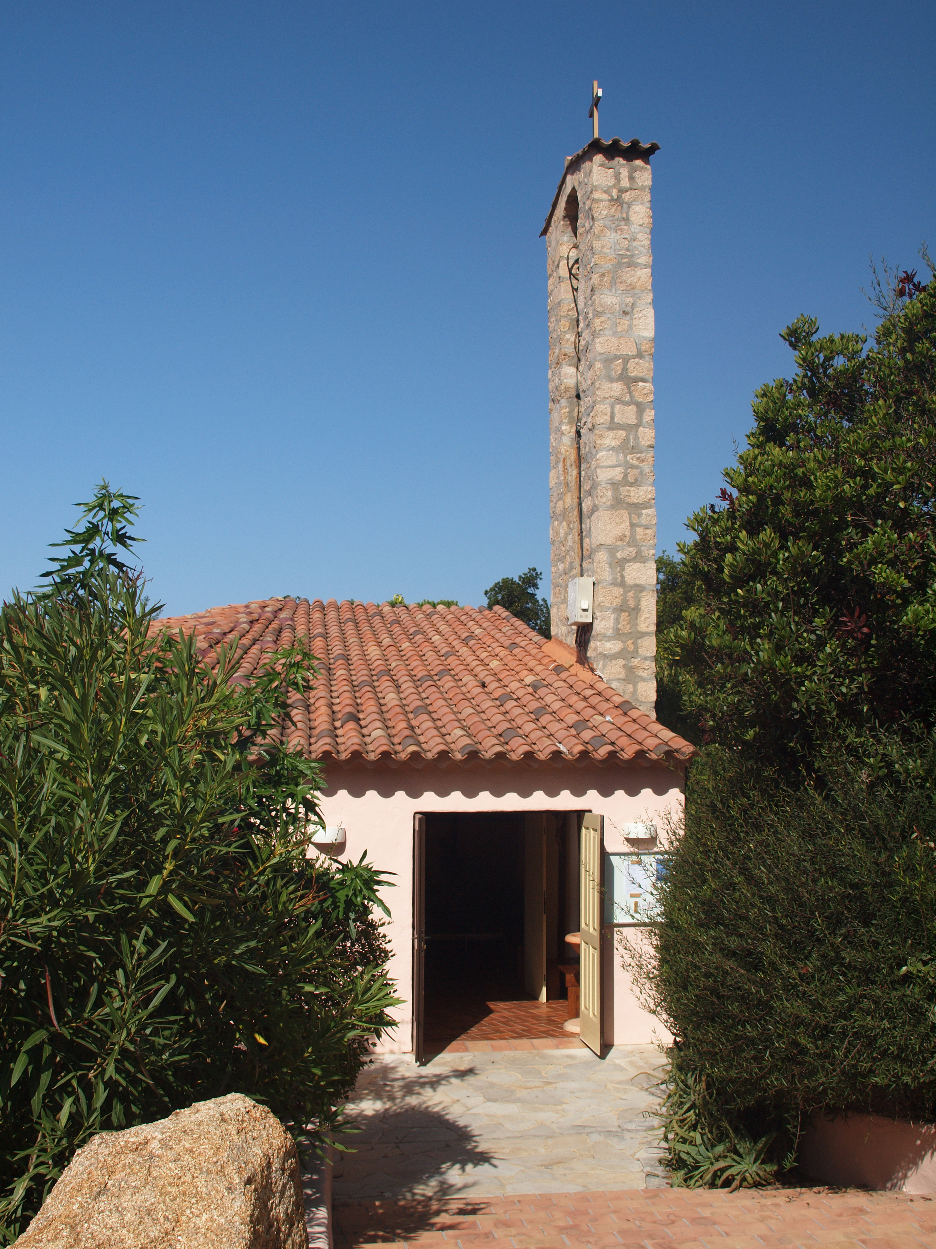 Pietrosella (Corse) - Église paroissiale Sainte-Monique